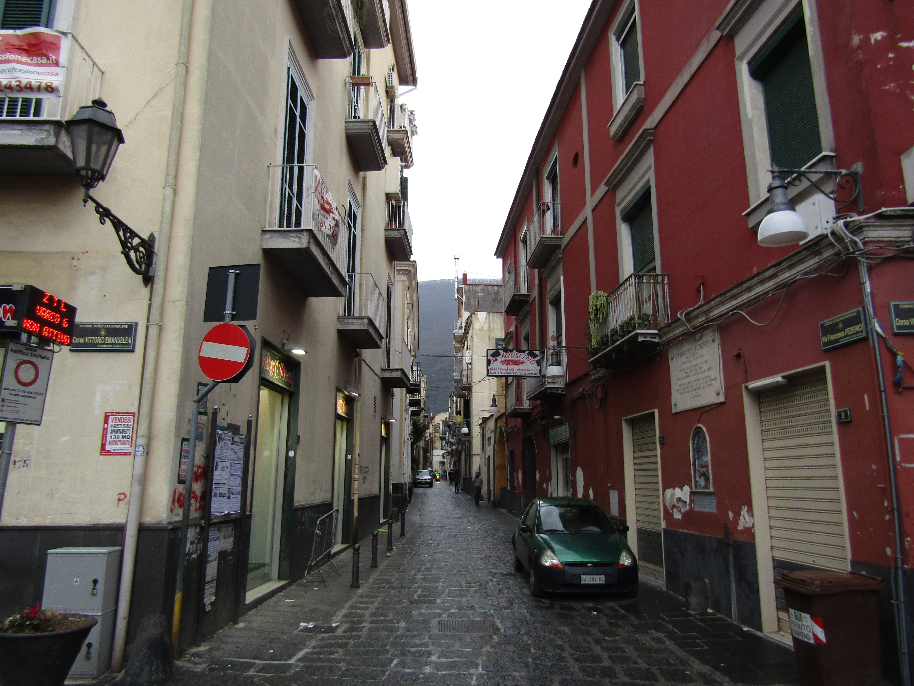 Template:Informazioni file